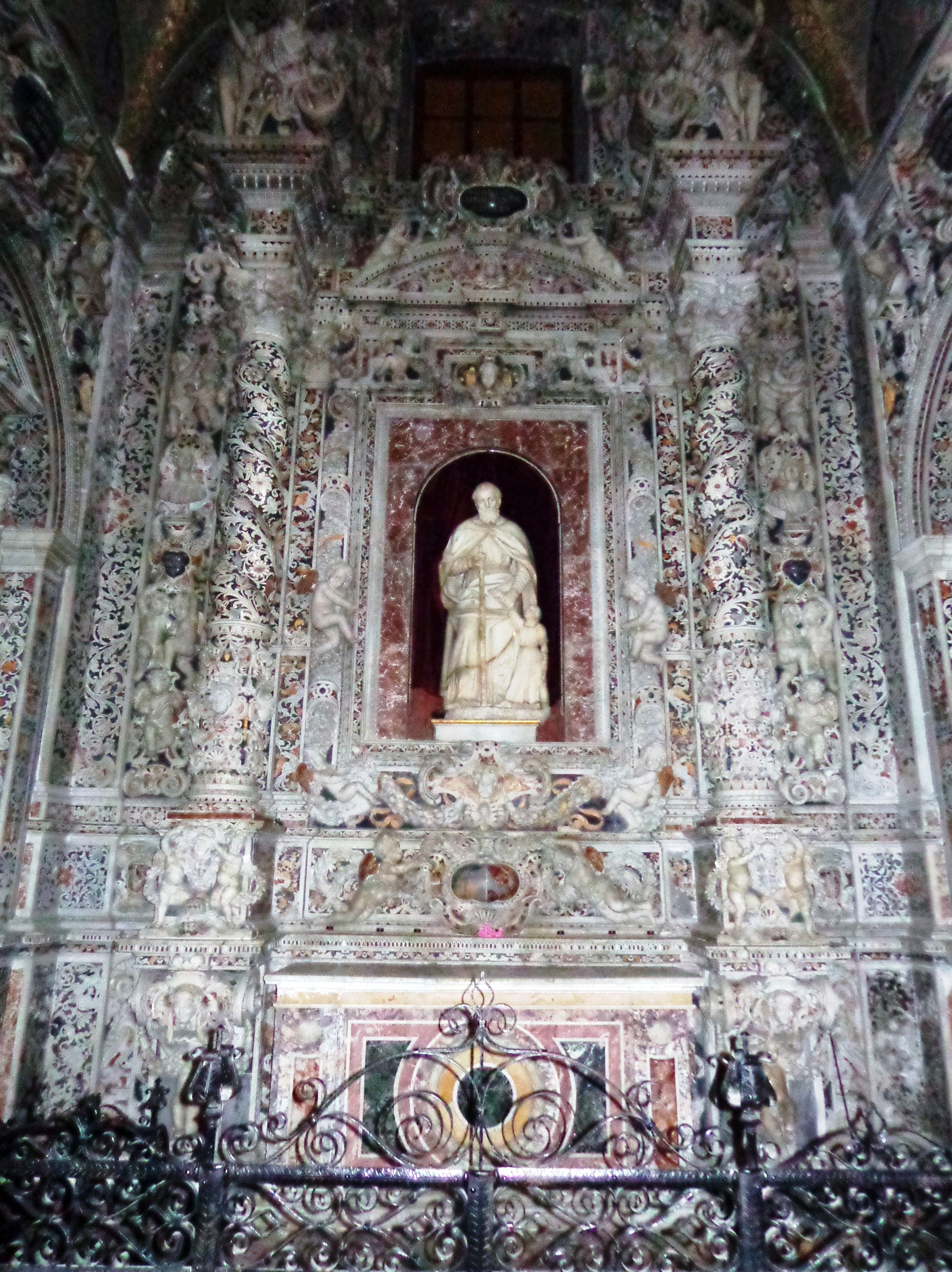 San Domenico PA 11